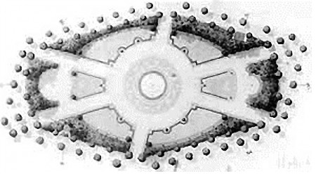 Der Viktoria-Luise-Platz in Berlin-Schöneberg. Entwurfszeichnung, Grundriss.